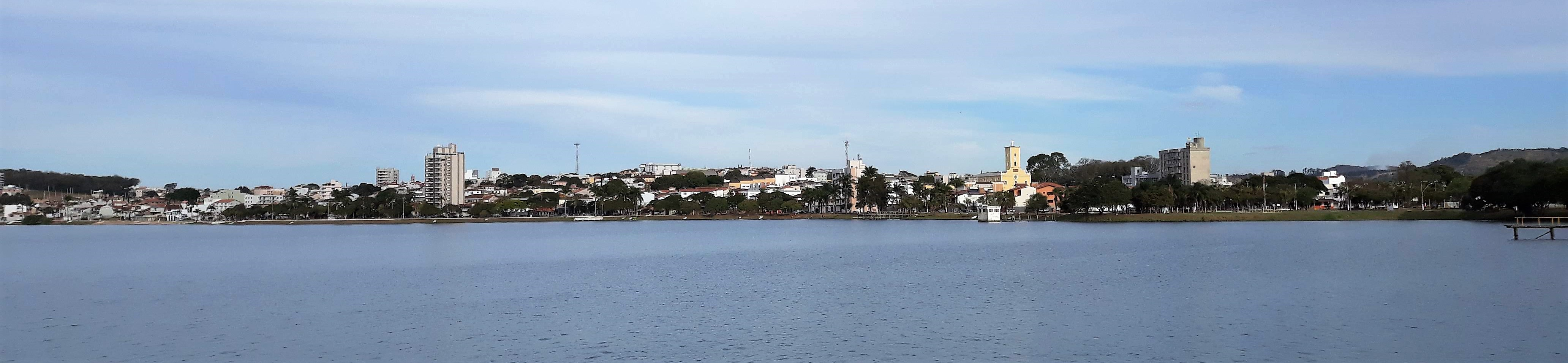 Vista panorâmica para a cidade de Boa Esperança.